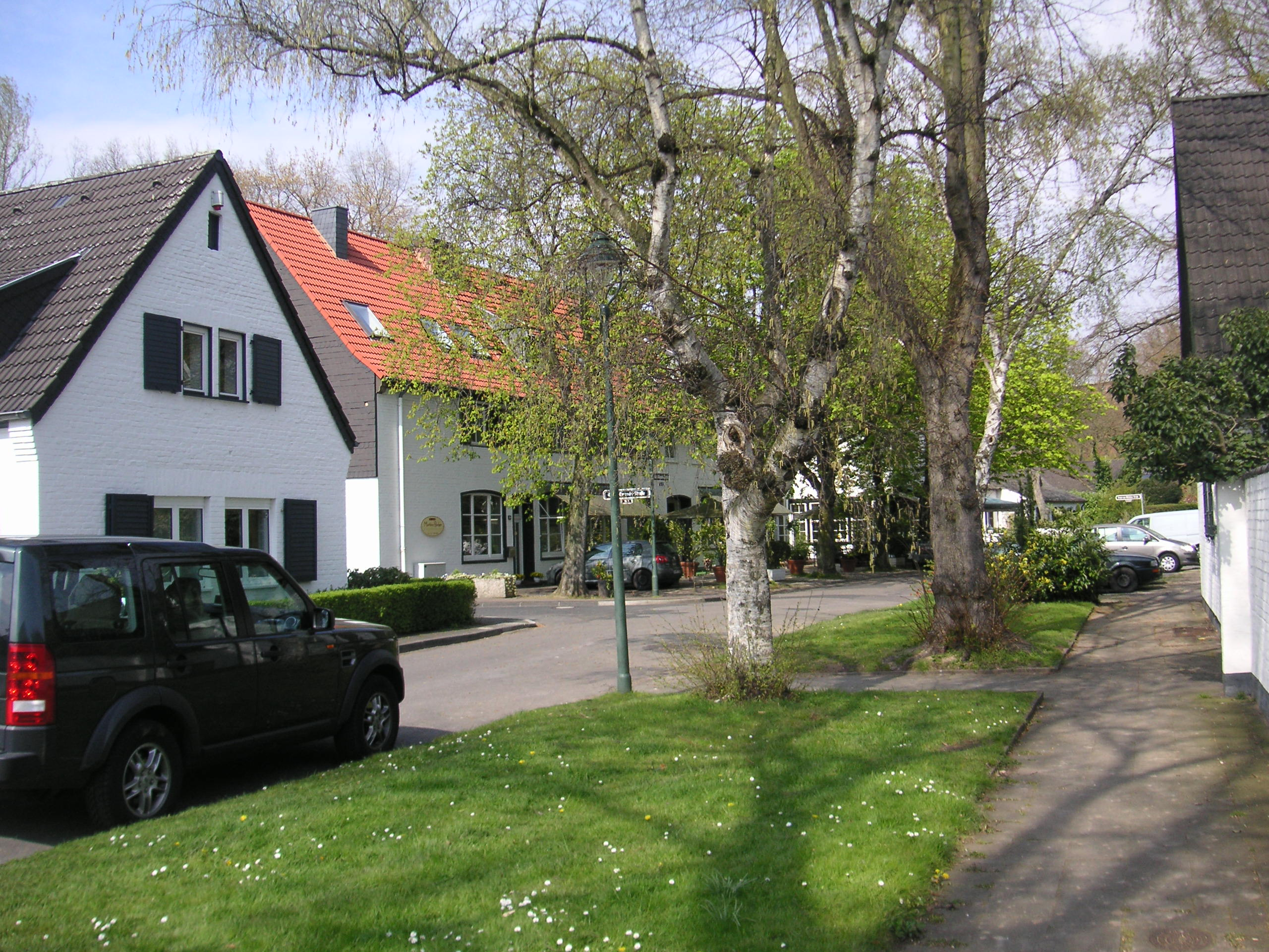 Düsseldorf-Golzheim, Golzheimer Siedlung